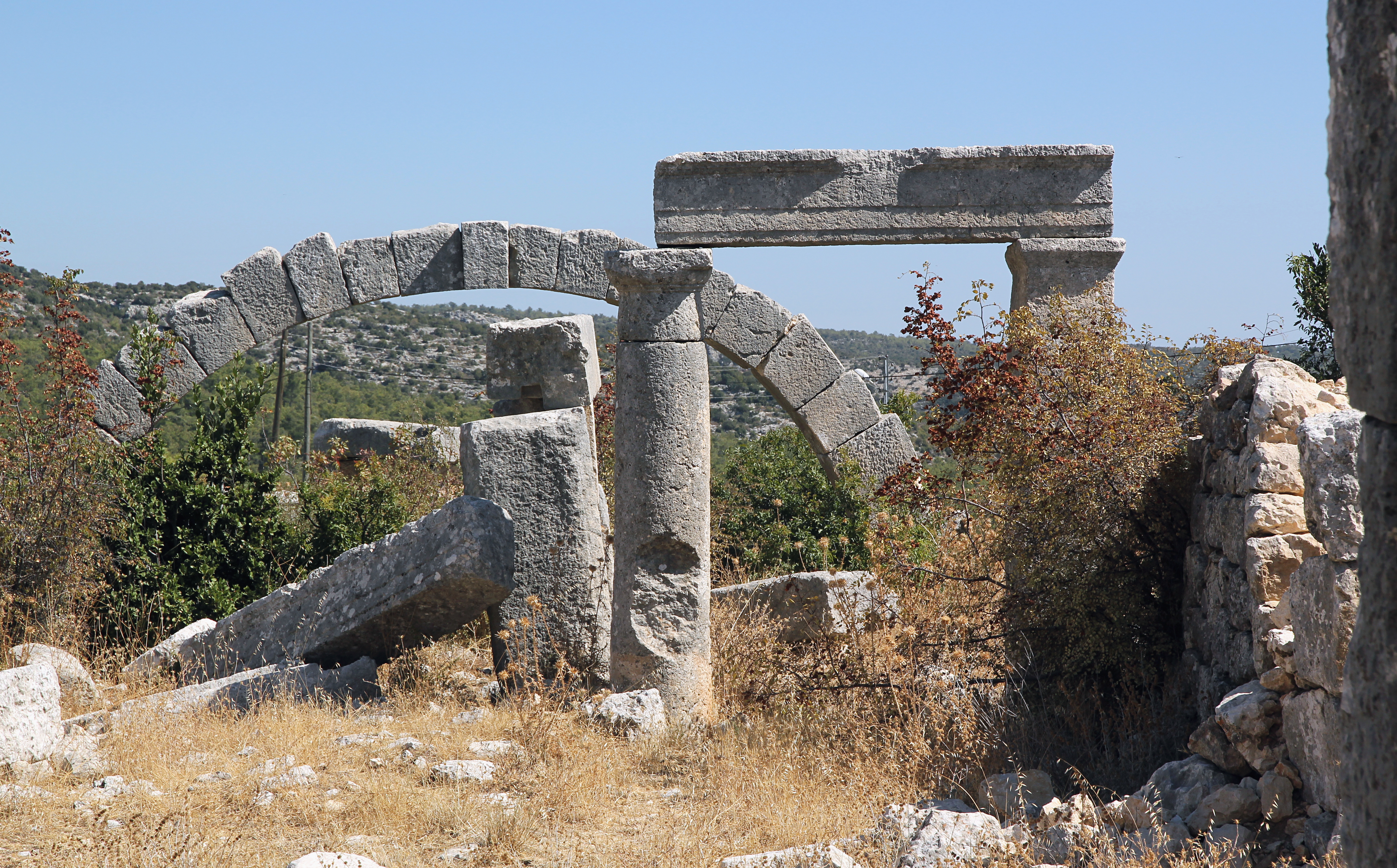 Karaböcülü, römisch-frühbyzantinische Siedlung im Rauhen Kilikien, Südtürkei